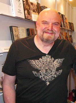 Andrzej Mleczko